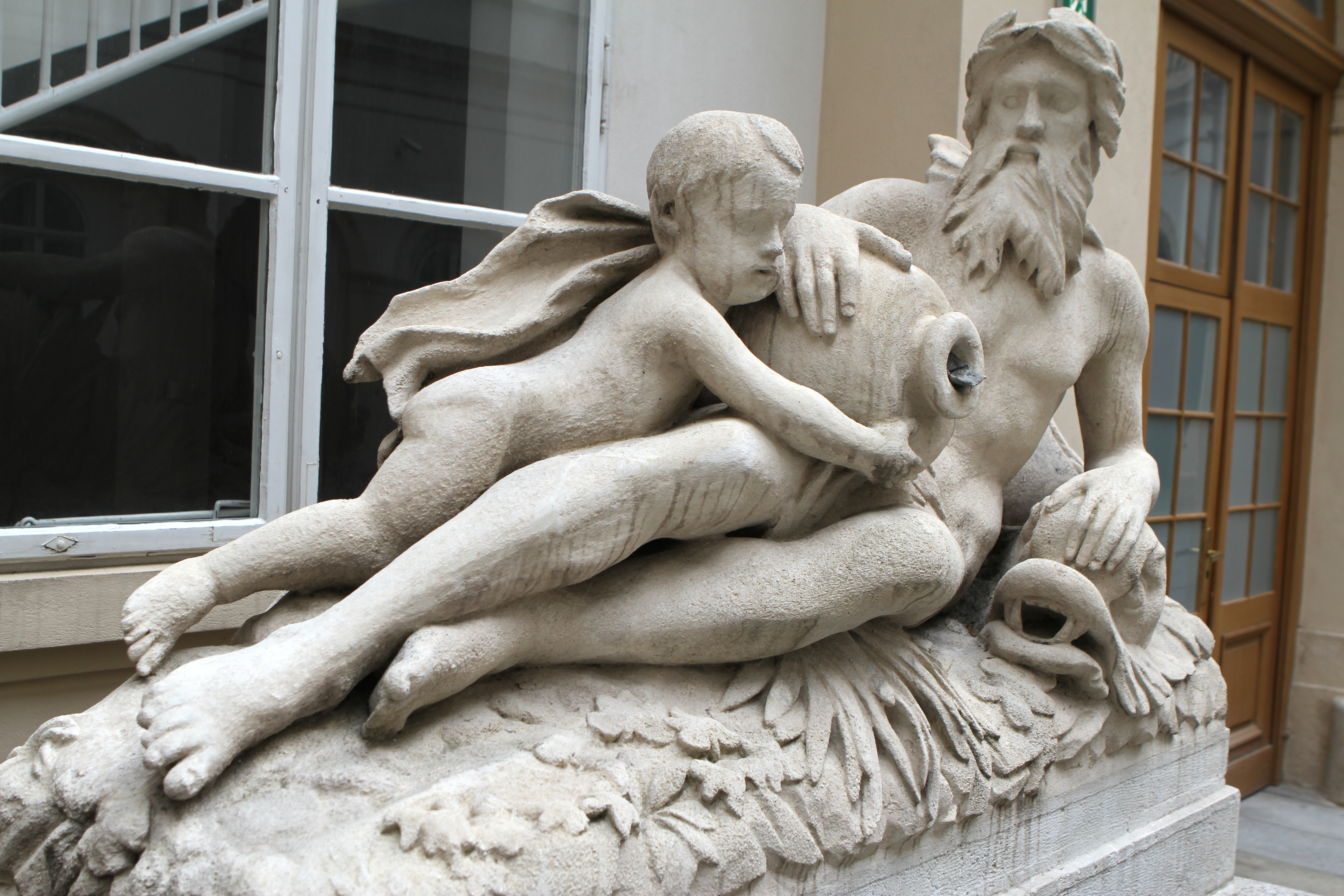 Isterbrunnen